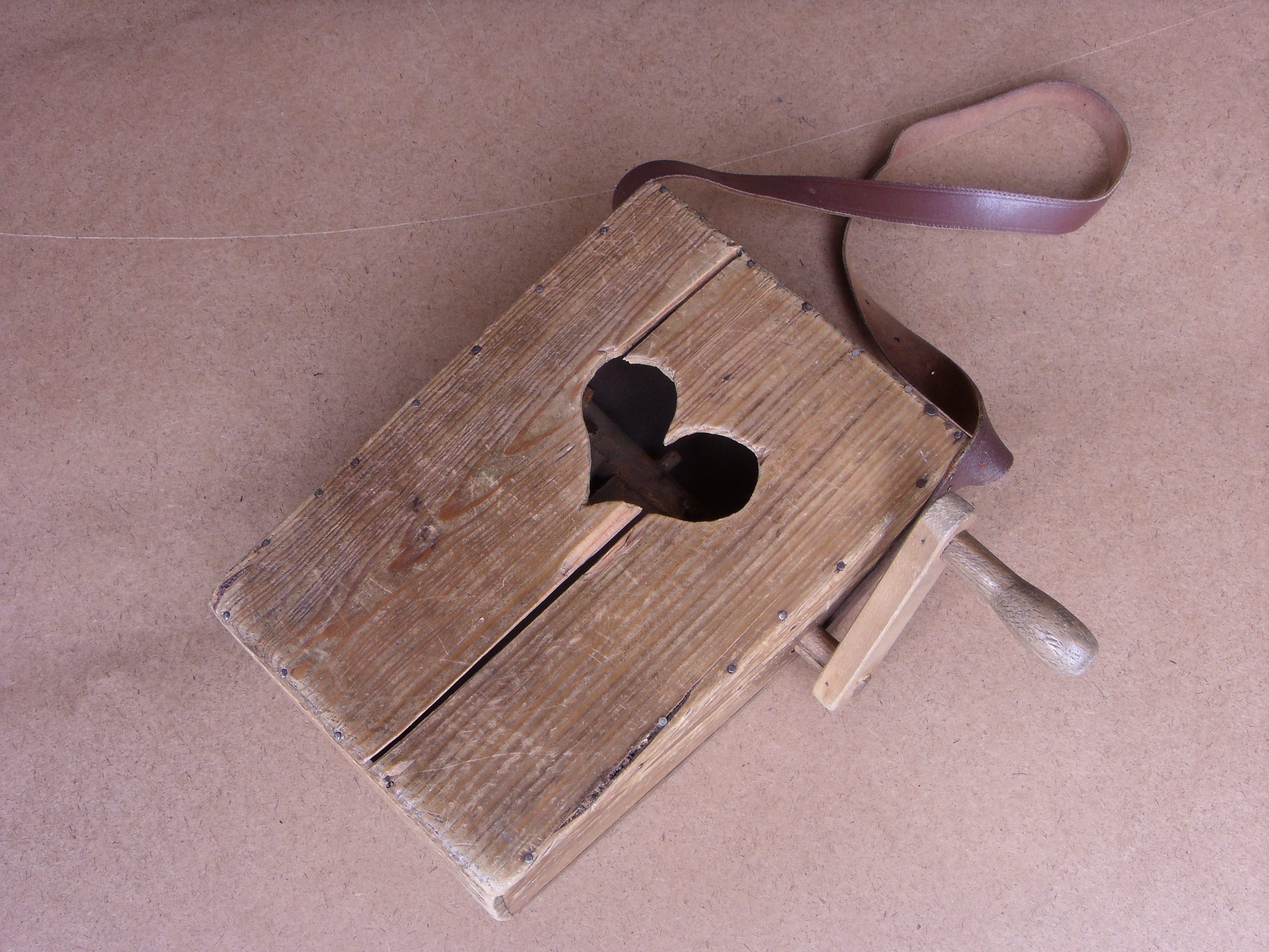 Eng Klibber, Enn 1930er Joeren